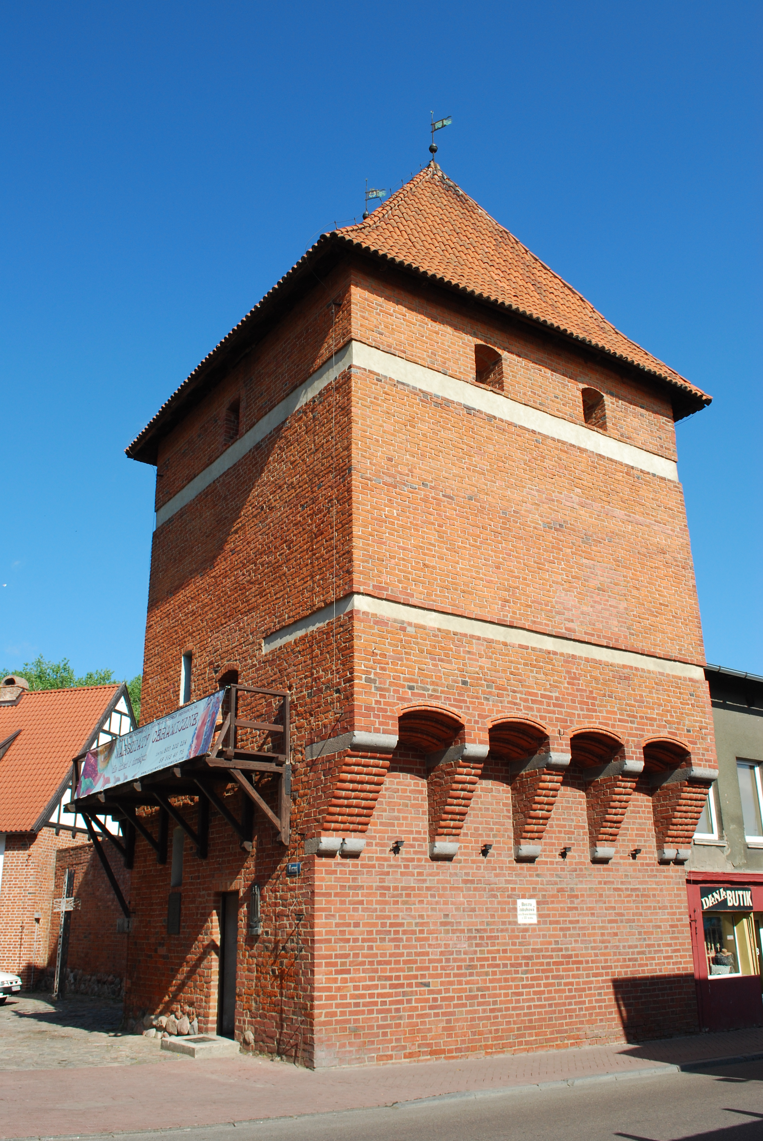 Starogard Gdański - Baszta Gdańska (Szewska) w zespole murów obronnych